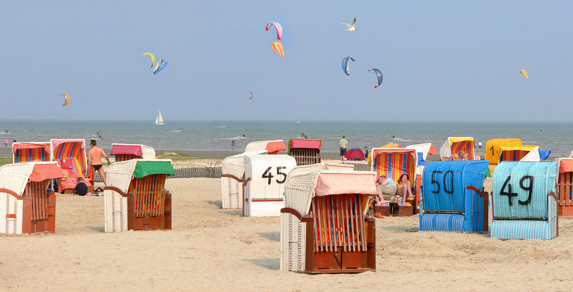 Strand von Schillig mit Kite Sport